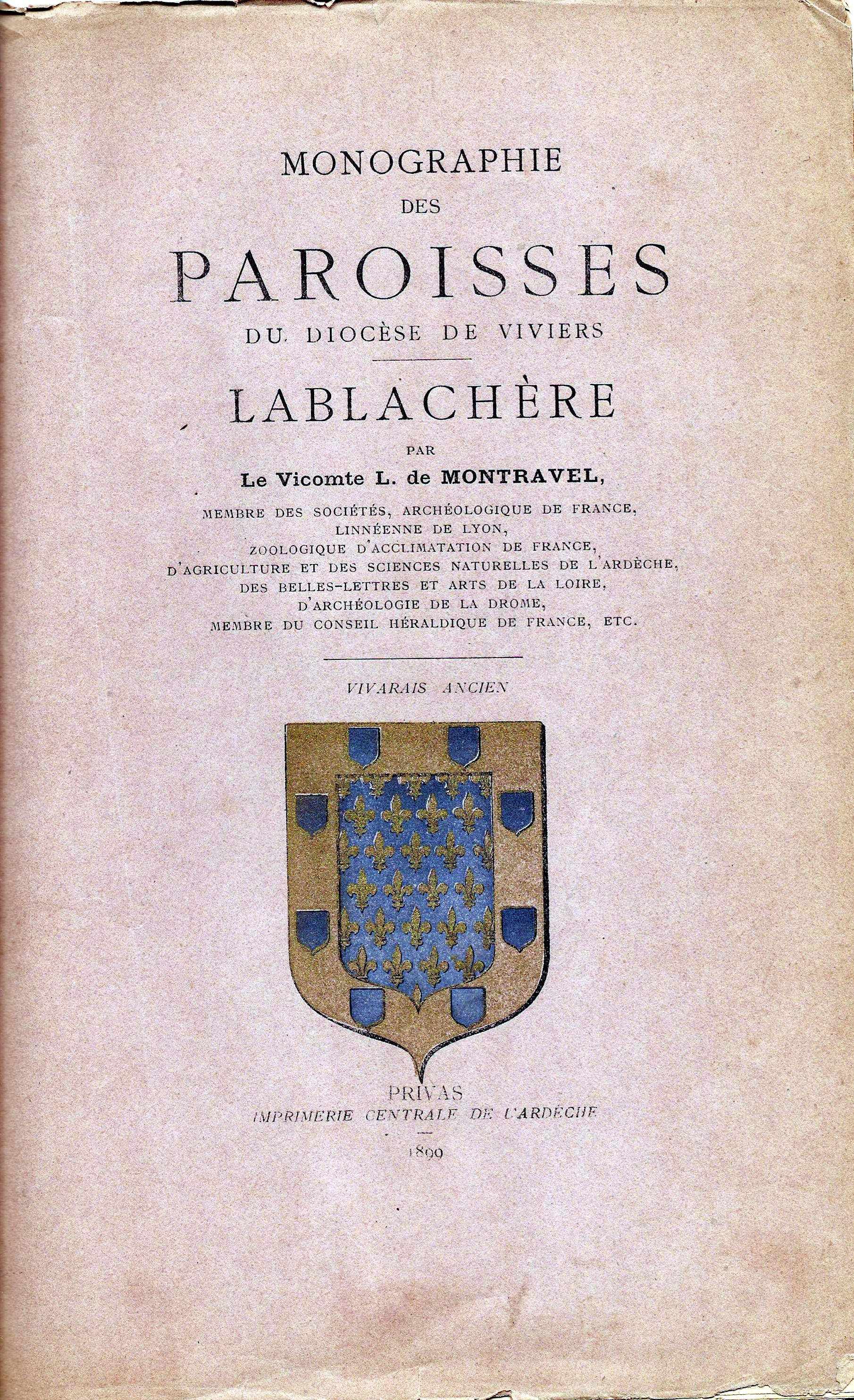 Couverture d'une monographie sur la commune de Joyeuse dans le département français de l'Ardèche par le Vicomte de Montravel éditée en 1890 par la Revue du Vivarais.